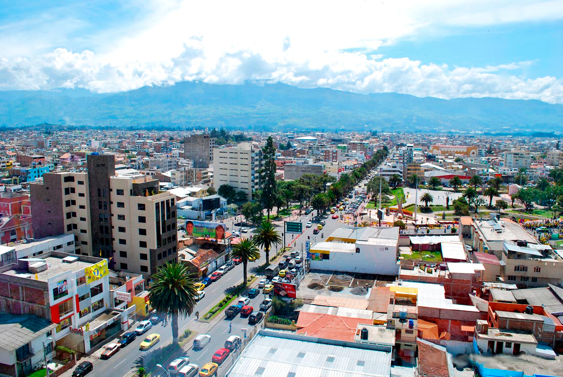 Fotografía de la ciudad de RIobamba: Se visualiza la famosa avenida Daniel León Borja